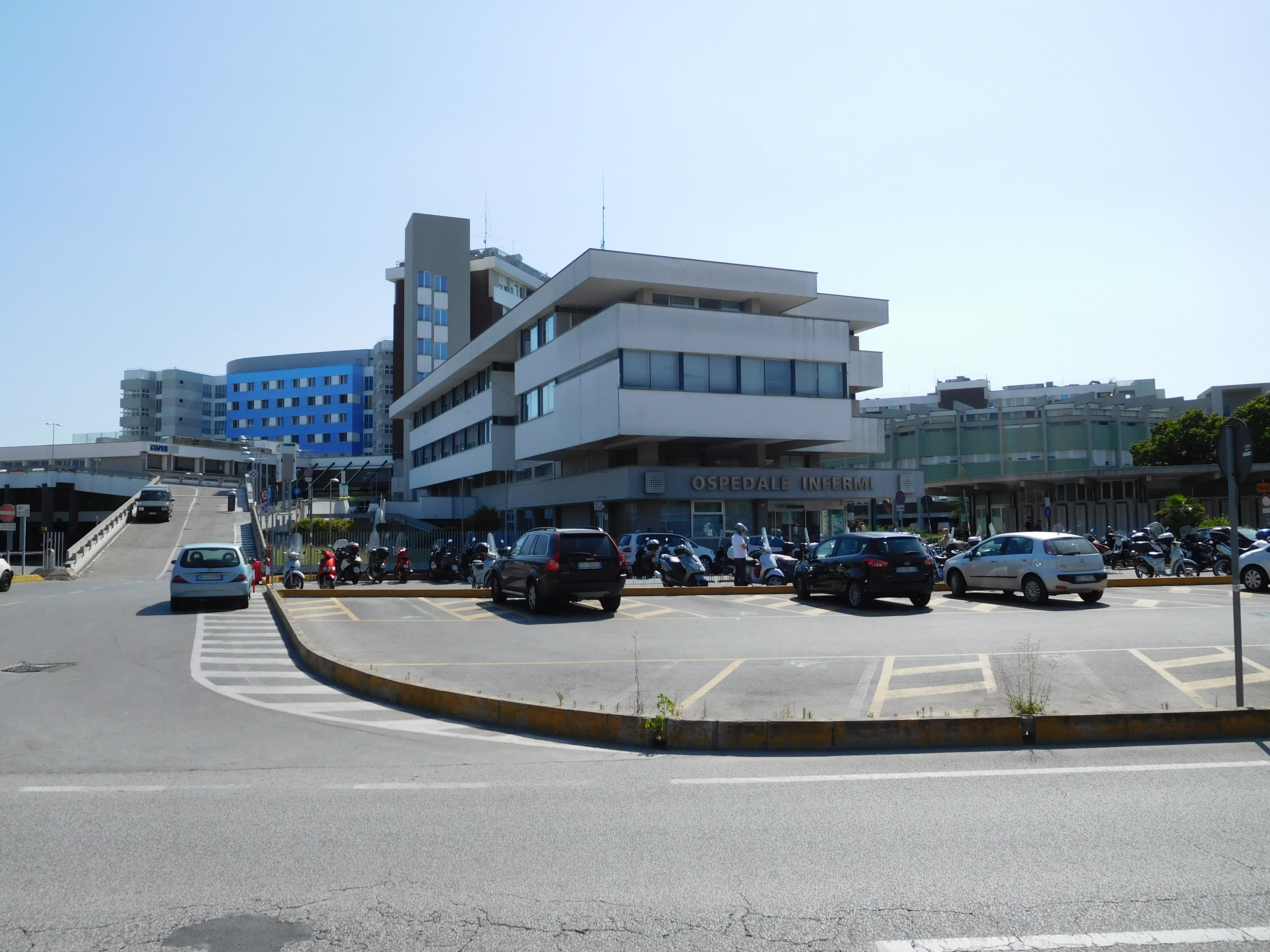 L'ingresso principale dell'ospedale "Infermi" di Rimini.